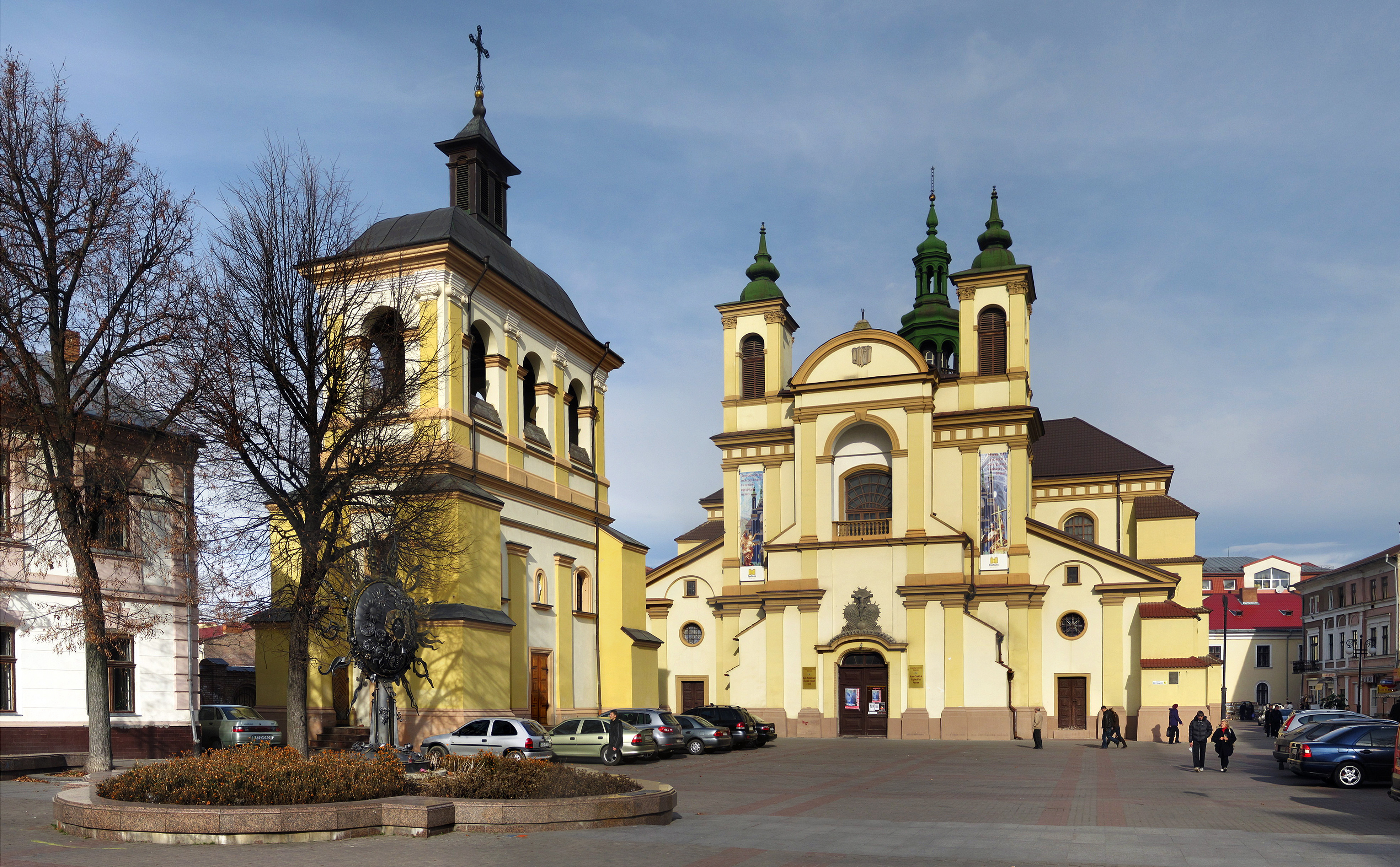 Колегіальний_костел_(Івано-Франківськ)